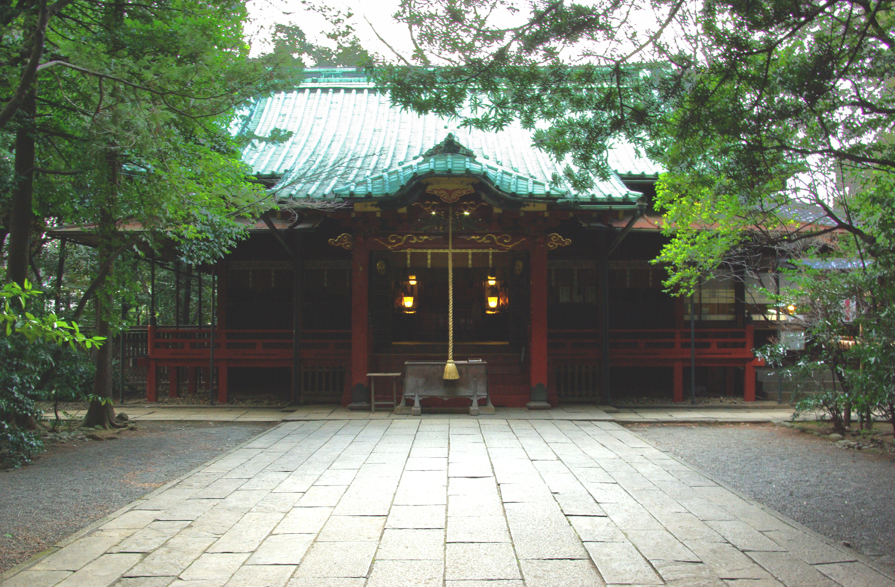 東京都港区赤坂の氷川神社